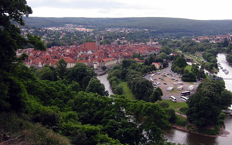 Blick von der Weserliedanlage auf die Stadt Hann. Münden. Deutlich zu erkennen ist der historische Stadtkern mit der Hauptkirche St.Blasius. Im Vordergrund der Tanzwerder, eine Insel, die auf ihrer östlichen Seite von der Werra (links im Bild) und ihrer westlichen Seite von der Fulda (im Bild rechts) umflossen wird. An der Spitze des Tanzwerders entsteht durch den Zusammenfluss von Werra und Fulda die Weser. An dieser Stelle befindet sich der Weserstein.